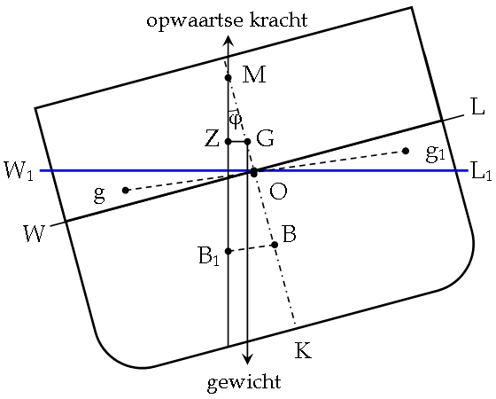 Drukkingspunt en metacentrum met in- en uittredende wiggen